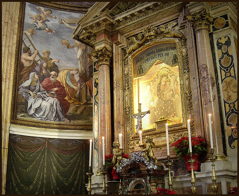 detalhe do altar principal da igreja de Santa Maria ai Monti, Roma, com a imagem de Nossa Senhora